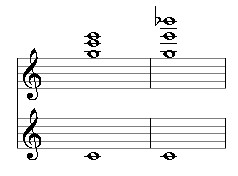 Beispiele einer Sesqiualtera 3-fach (Orgel).